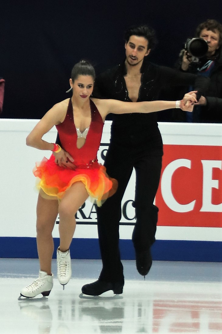 Жасмин Тессари и Франческо Фиоретти (Италия) на Чемпионате Европы по фигурному катанию 2018.